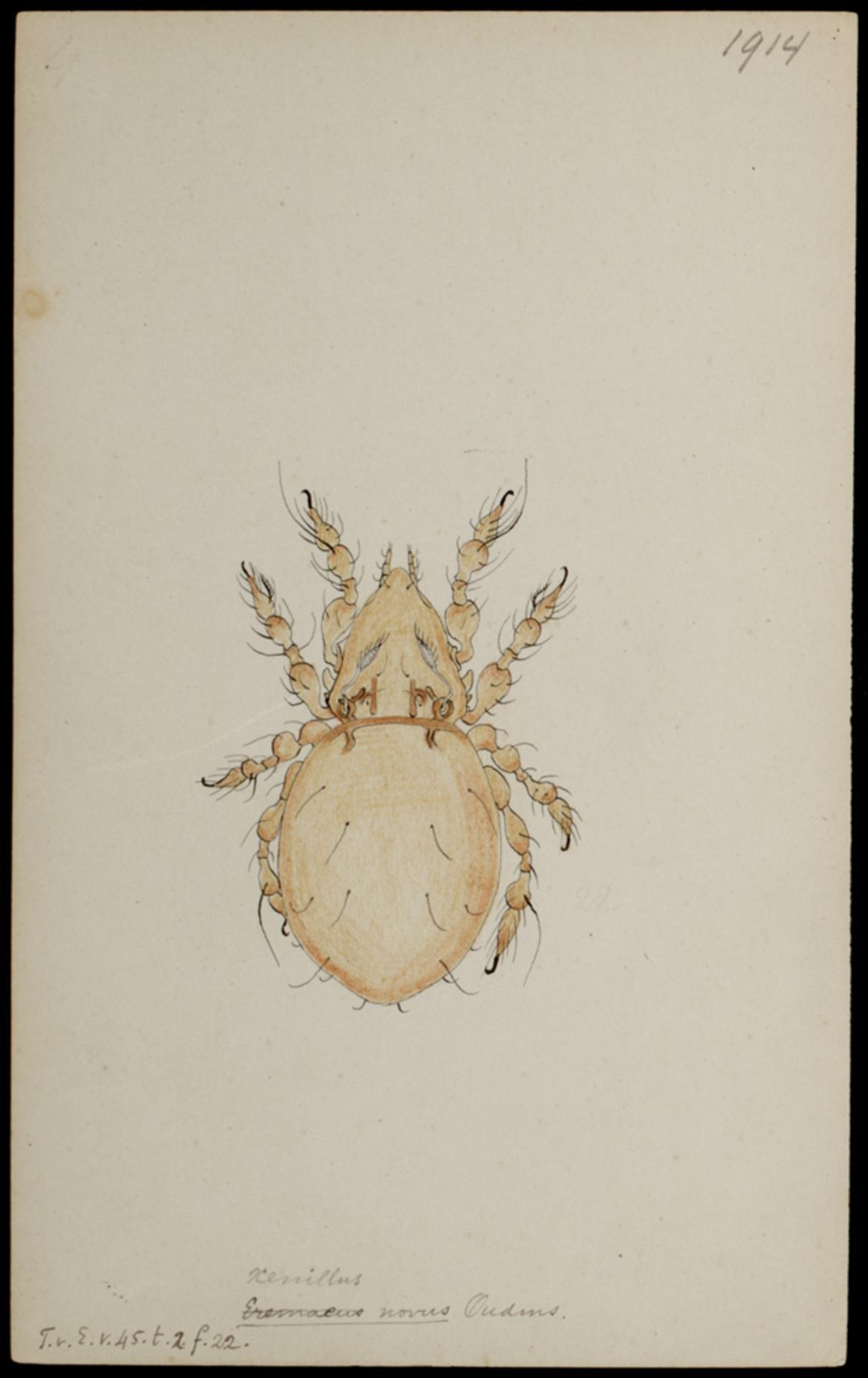 Xenillus novus (Oudemans)